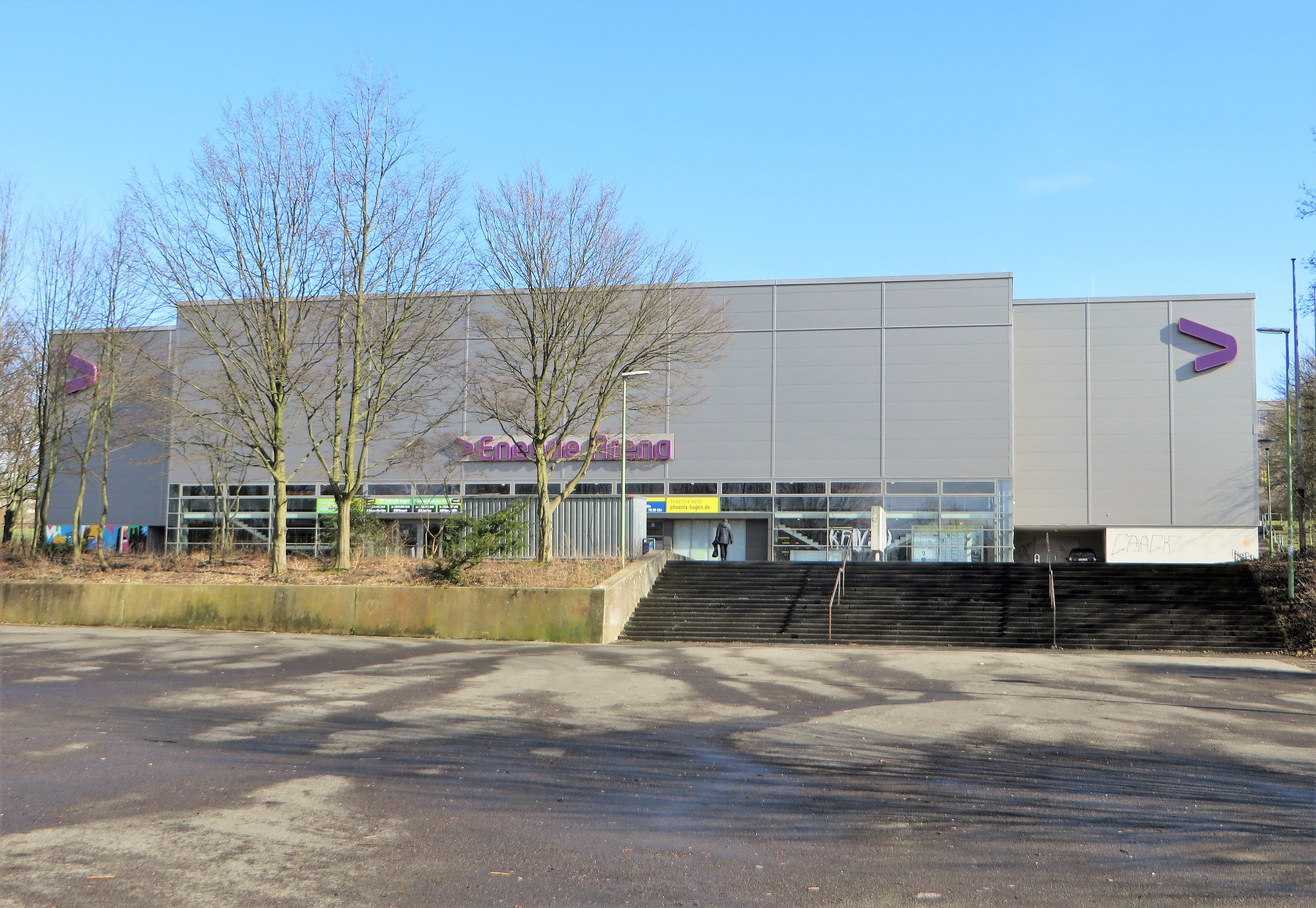 Enervie-Arena (seit 2010) in Hagen, Stadionstraße 21 (früher Ischeland-Halle). Heimspielstätte der Basketballer von Phoenix Hagen und der Handballer vom Vfl Eintracht. Die Halle fast über 3000 Zuschauer. Im Sommer 2018 umbenannt in Krollmann Arena.